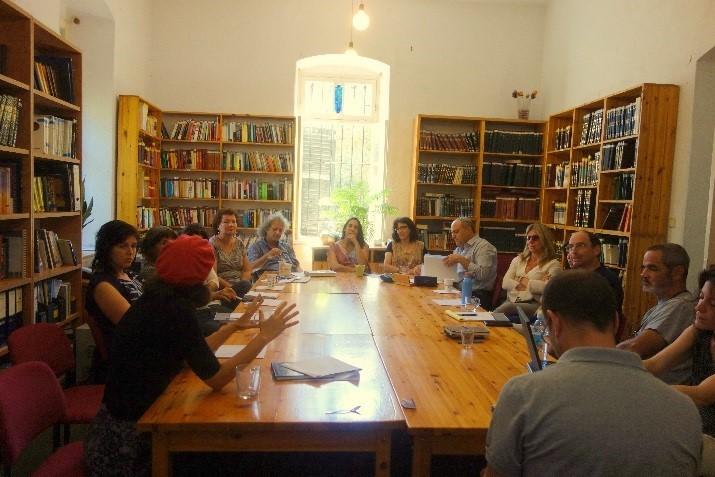 לימוד בבית המדרש קולות